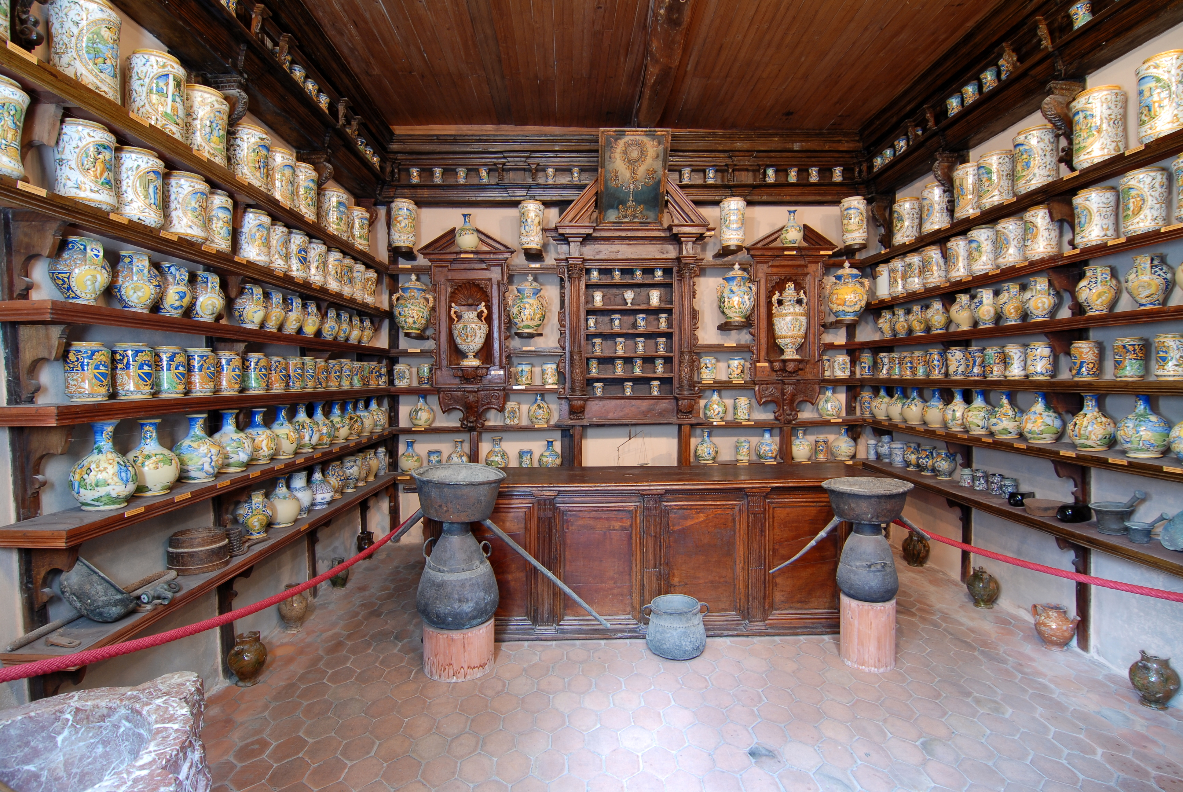 Corredo di maioliche del 1580 con stemma di Cesaro Candia provenienti dalla bottega di Mastro Antonio Patanazzi di Urbino